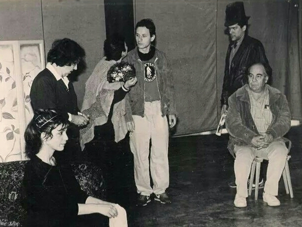 שידוכים מאת גוגל, תיאטרון חיפה